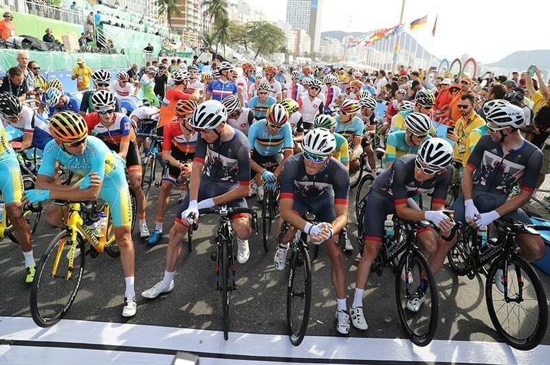 Road cycling at the 2016 Summer Olympics